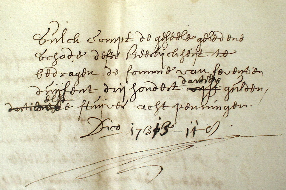 oorlogsschade in Lieshout 1702